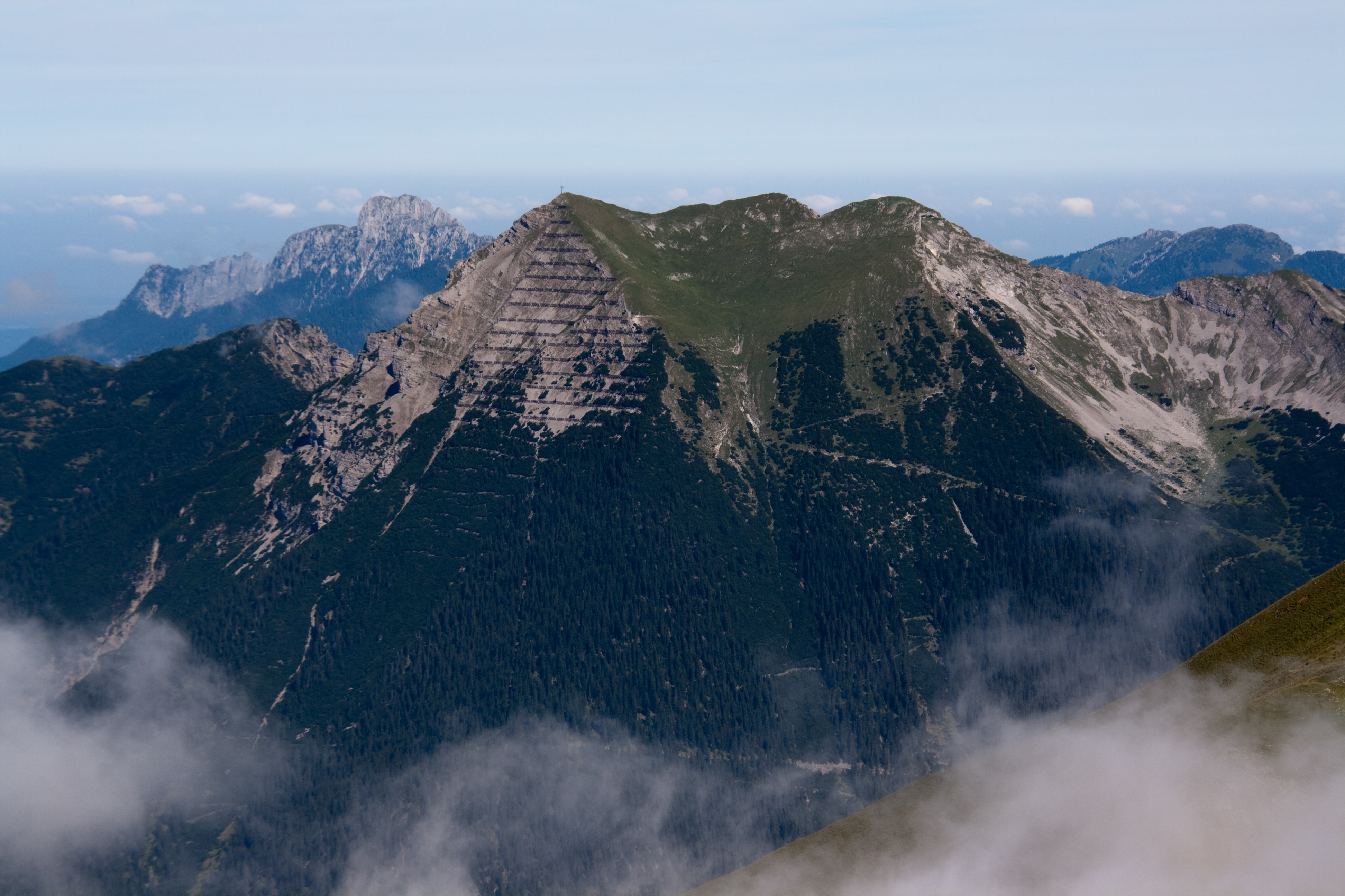 Die Kohlbergspitze von der Gartner Wand